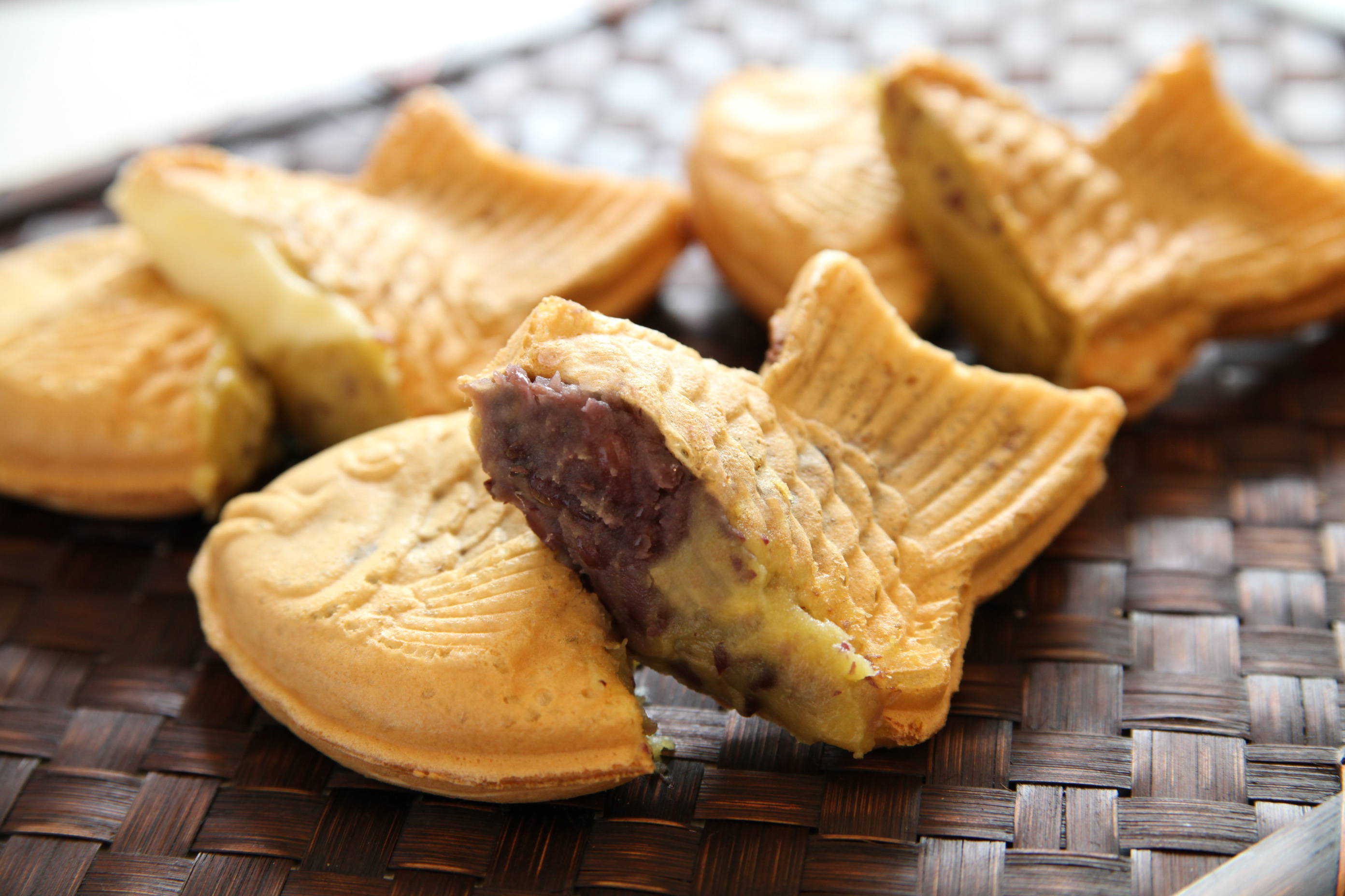 安納芋たい焼き